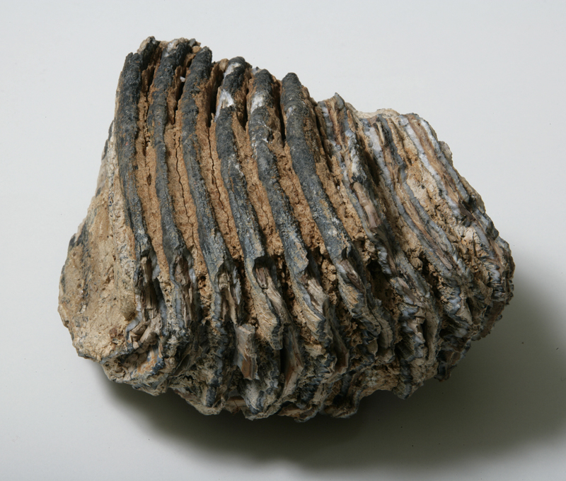 Fauna pleistocenica: II o III molare inferiore sinistro di Elephas Primigenius (mammut lanoso).